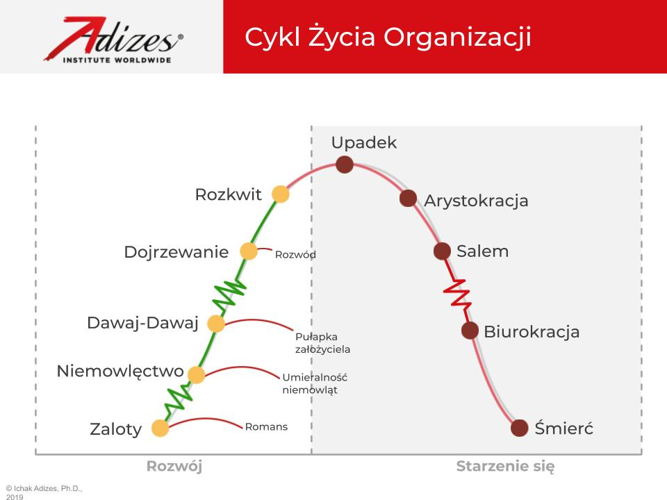 Cykl Życia Organizacji wg. Ichaka K. Adizesa